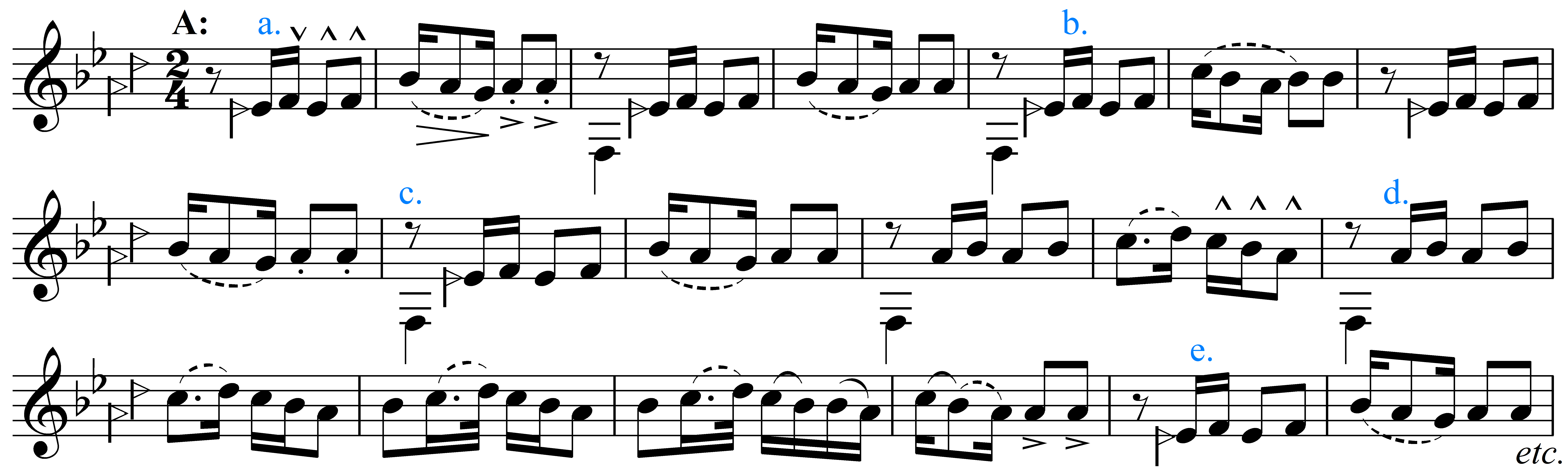 رنگ دلگشا از ردیف نورعلی برومند در دستگاه سه‌گاه لا کُرُن